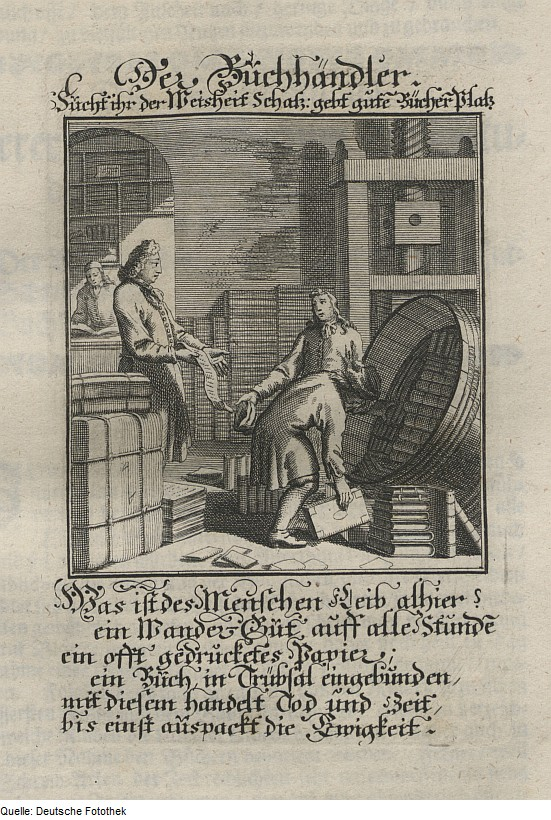 Original image description from the Deutsche FotothekStändebuch & Beruf & Handel & Buch & Buchhandel